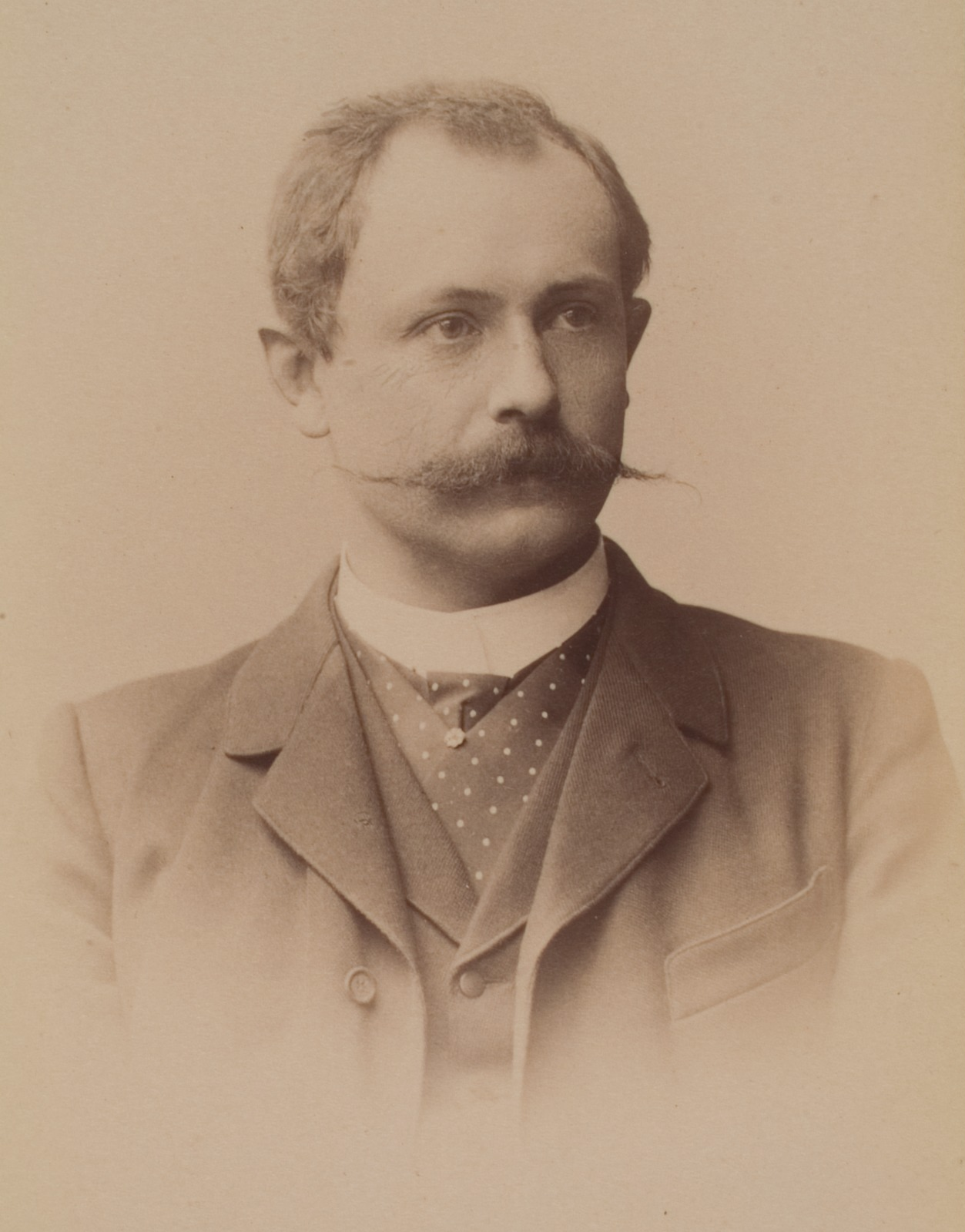 Eduard Karl Heinrich Bertold Heyck, Historiker, 1892–1896 Professor in Heidelberg